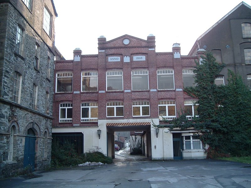 Hardt & Pocorny in Radevormwald-Dahlhausen Fotografiert von Benutzer:Taube Nuss im November 2004 "Lizenz: GNU FDL"